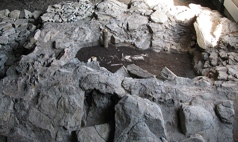 Pravěká mohyla